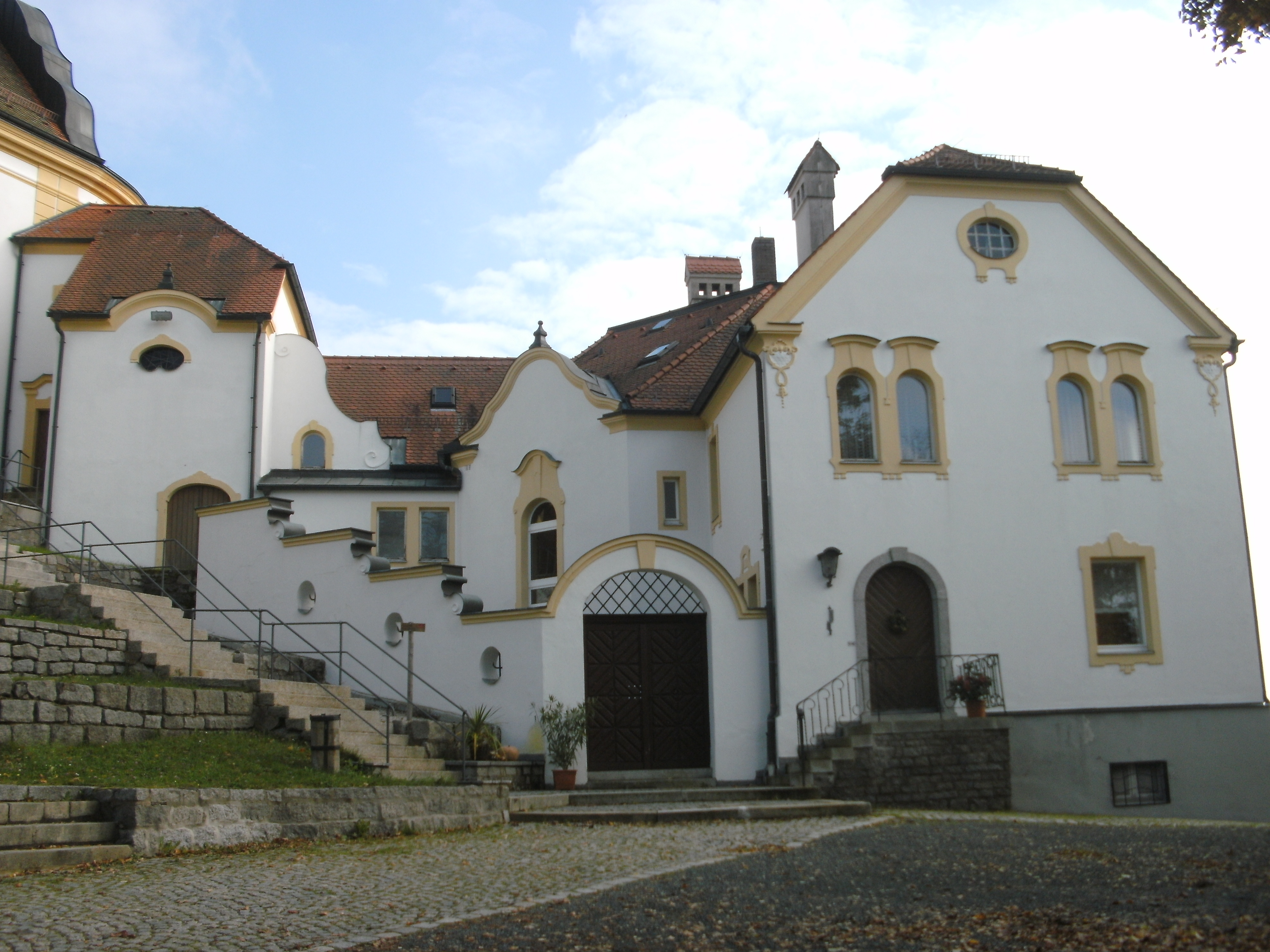 Kloster auf dem Kreuzberg in Pleystein (2014: Oblaten des hl. Franz von Sales)